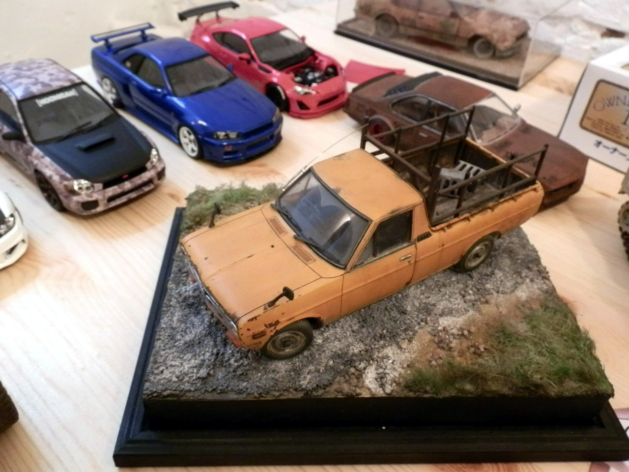 Пример стендовых автомоделей